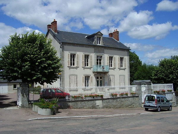 Mairie de Saint Martin du Puy (Nièvre)